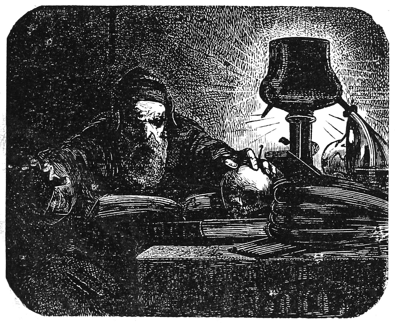 Illustration du Dictionnaire infernal par Louis Le Breton.